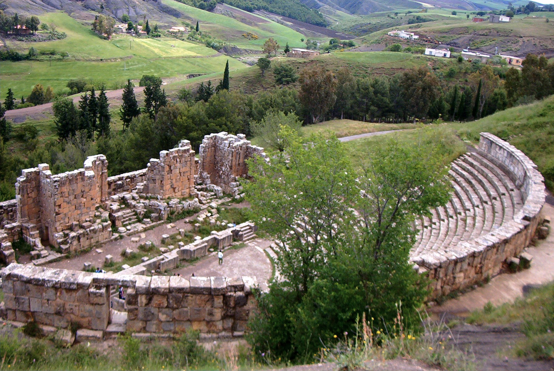 Le théâtre de Djemila